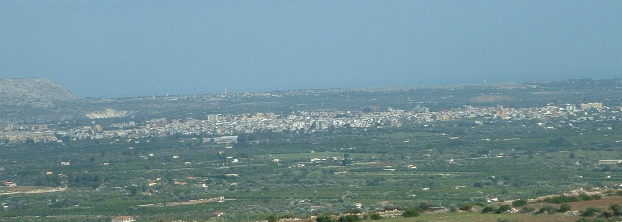 Floridia (SR), View from Canicattini Bagni (SR).